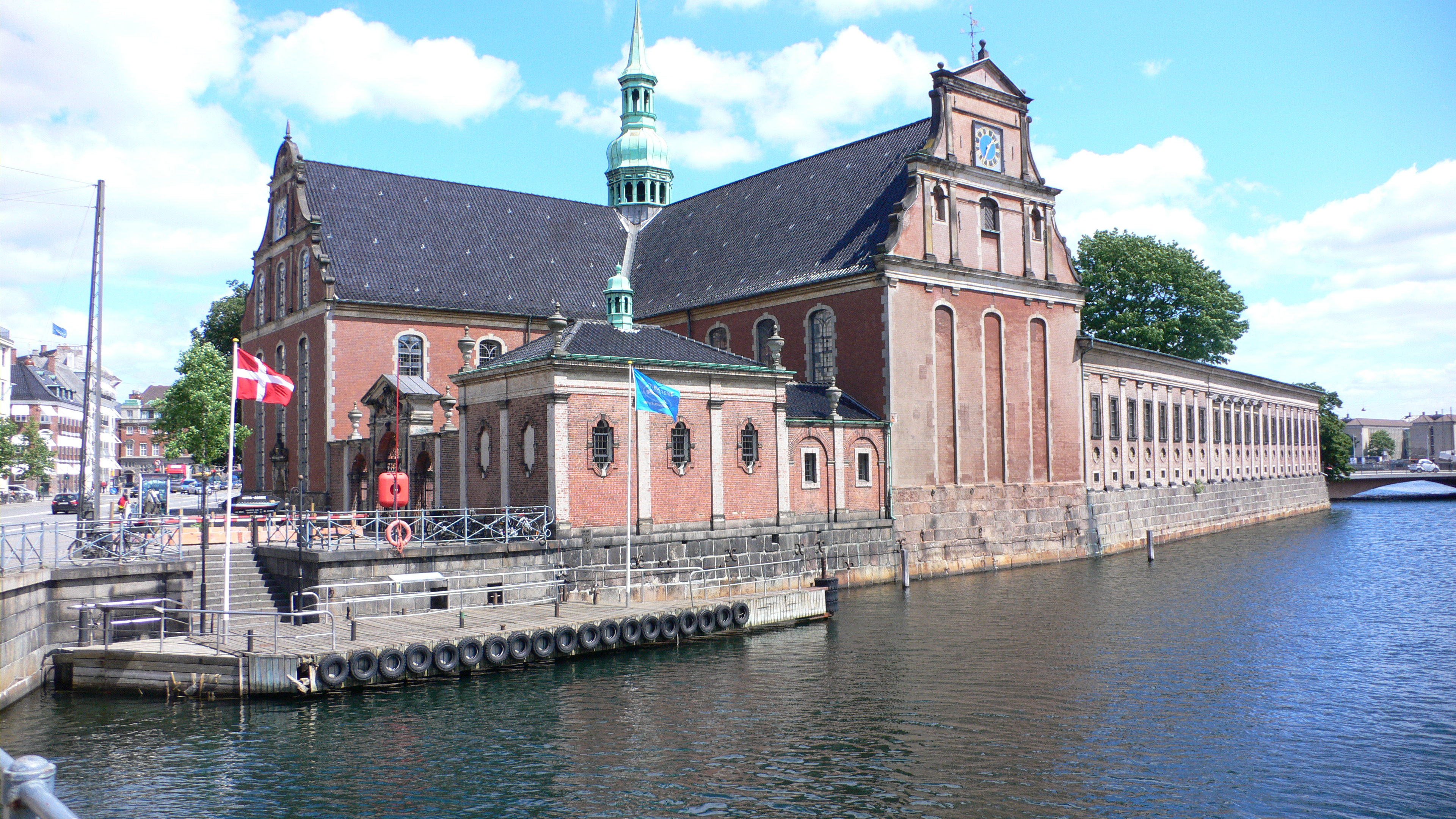 Church of Holmen in Copenhagen, Denmark